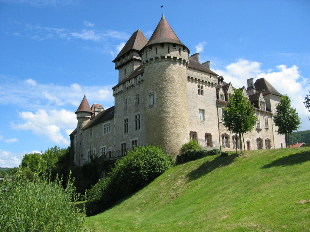 Chateau de Cleron dans le Doubs - France